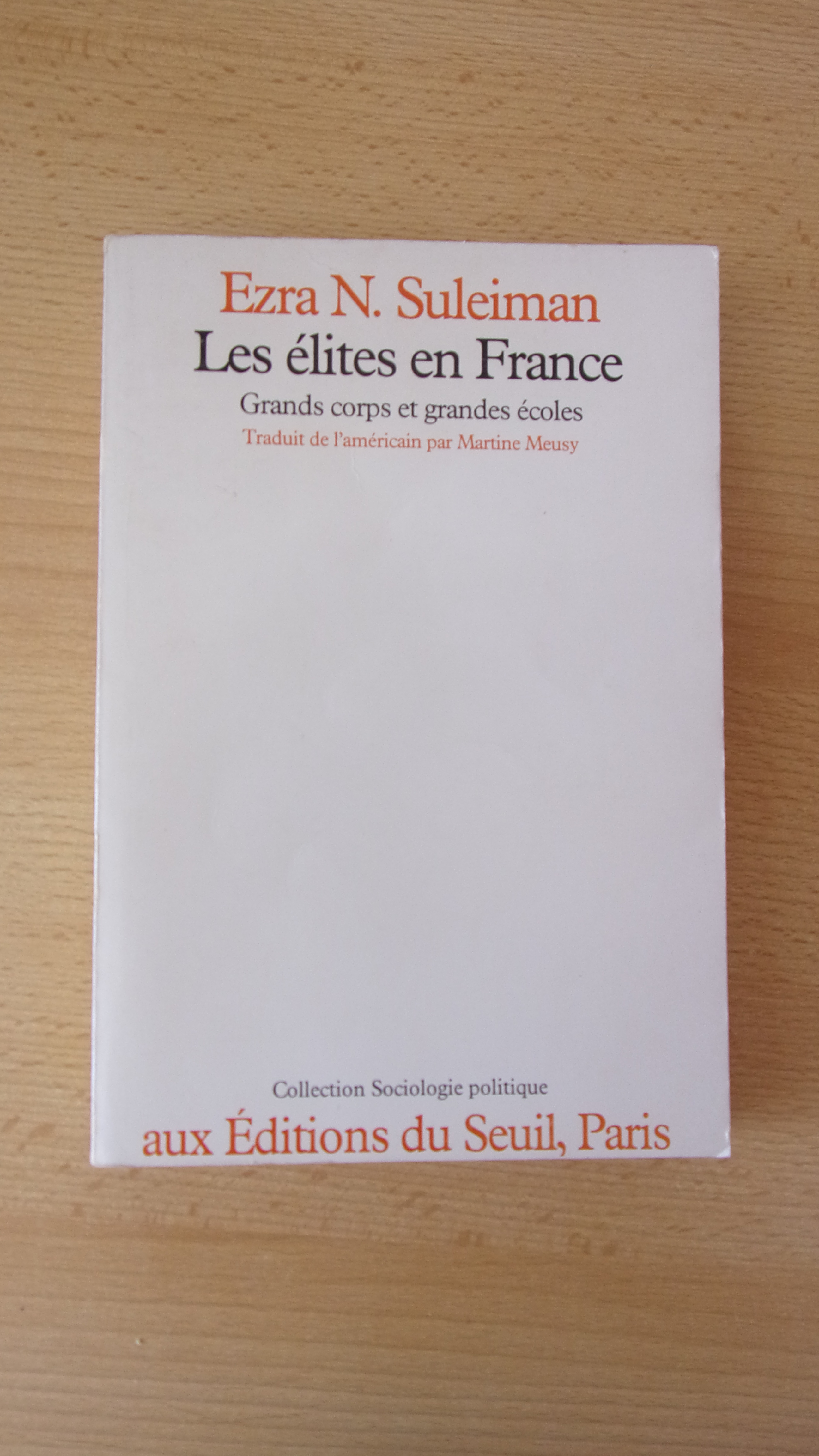 Les Élites en France - Ezra Suleiman.